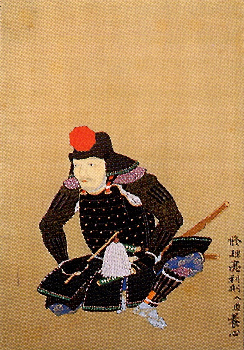 黒田利則の肖像。